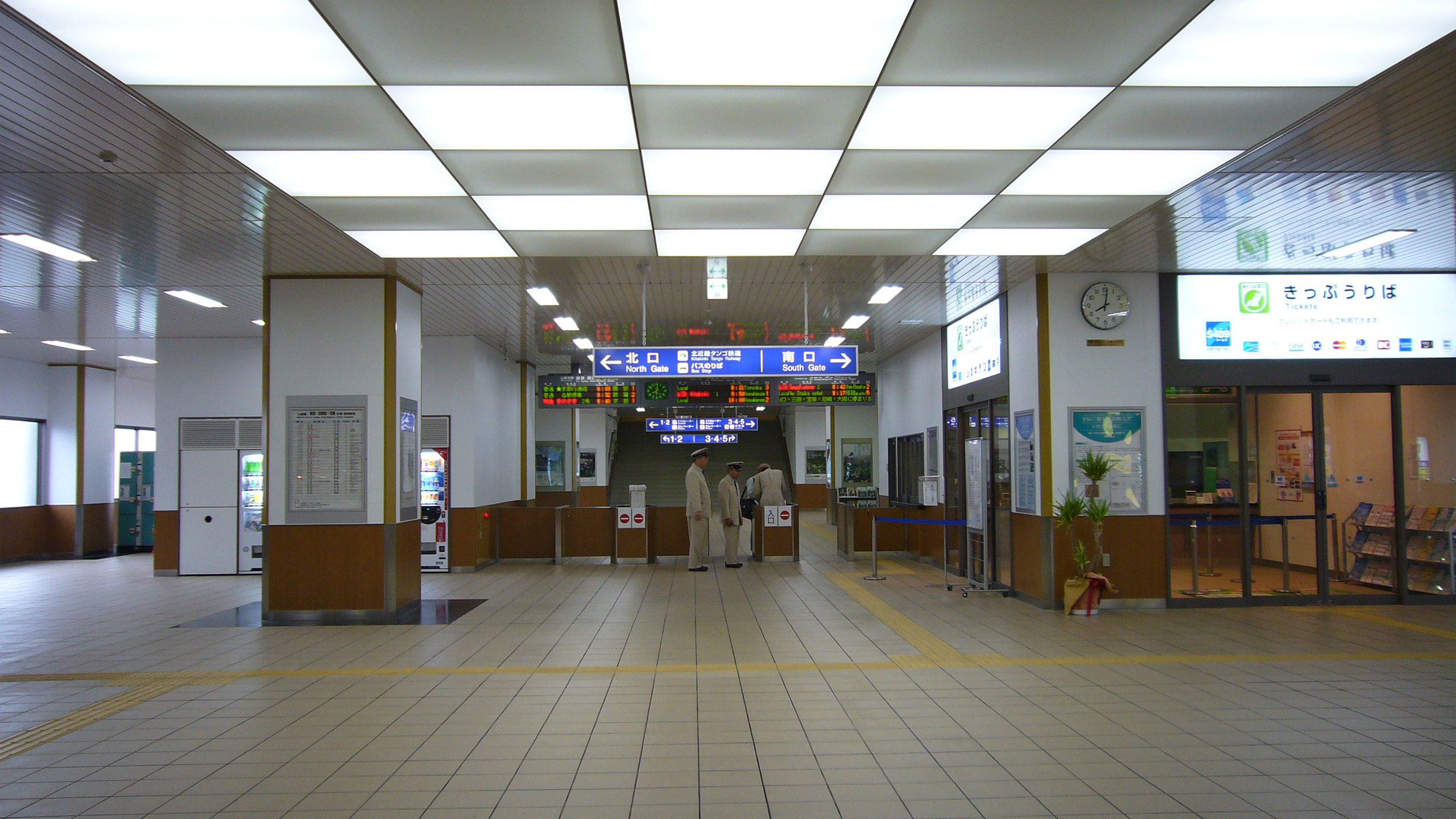 Fukuchiyama Station in Fukuchiyama, Kyoto, Japan